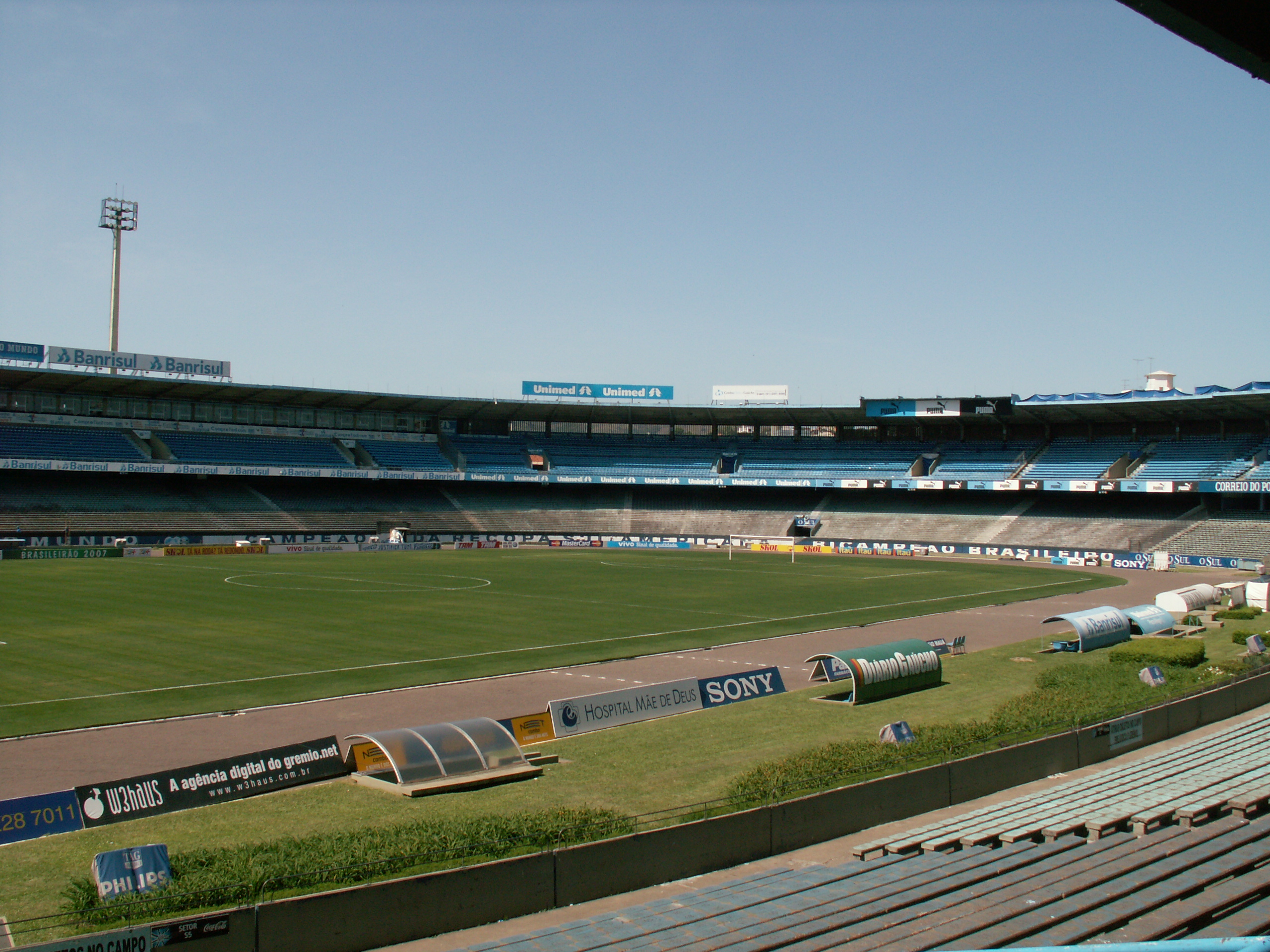 Gremio Stadium